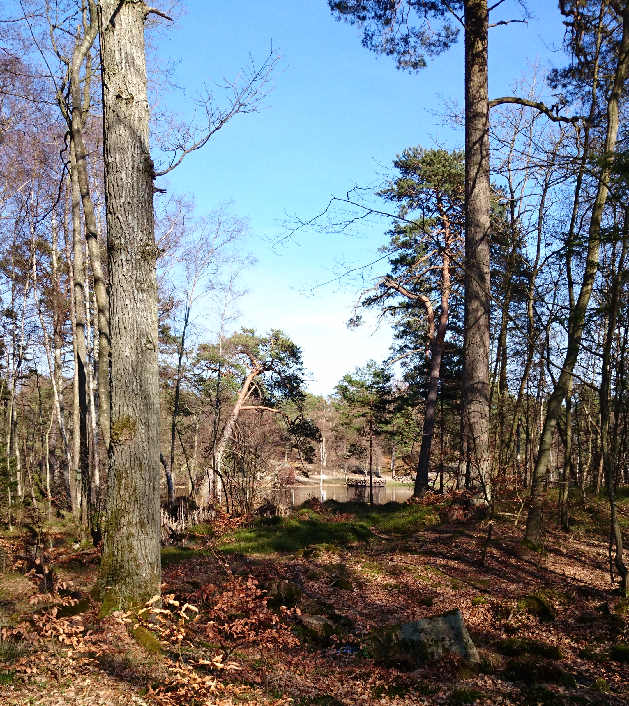 Trollsjön i Ronneby brunnspark 2017.